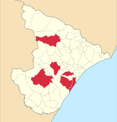 Municipalidades que possuem campi da Universidade Federal de Sergipe